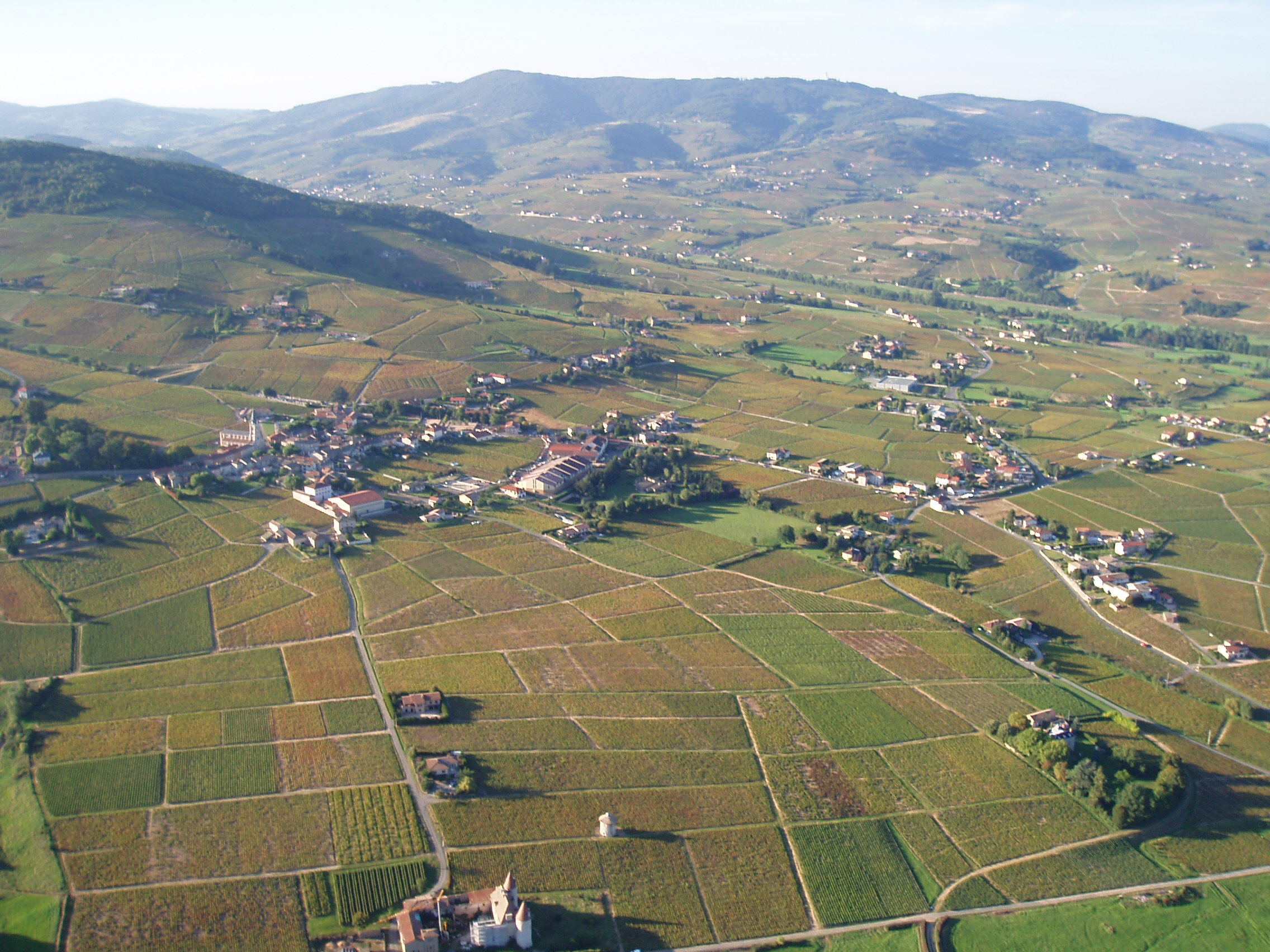 pris en vol de parapente